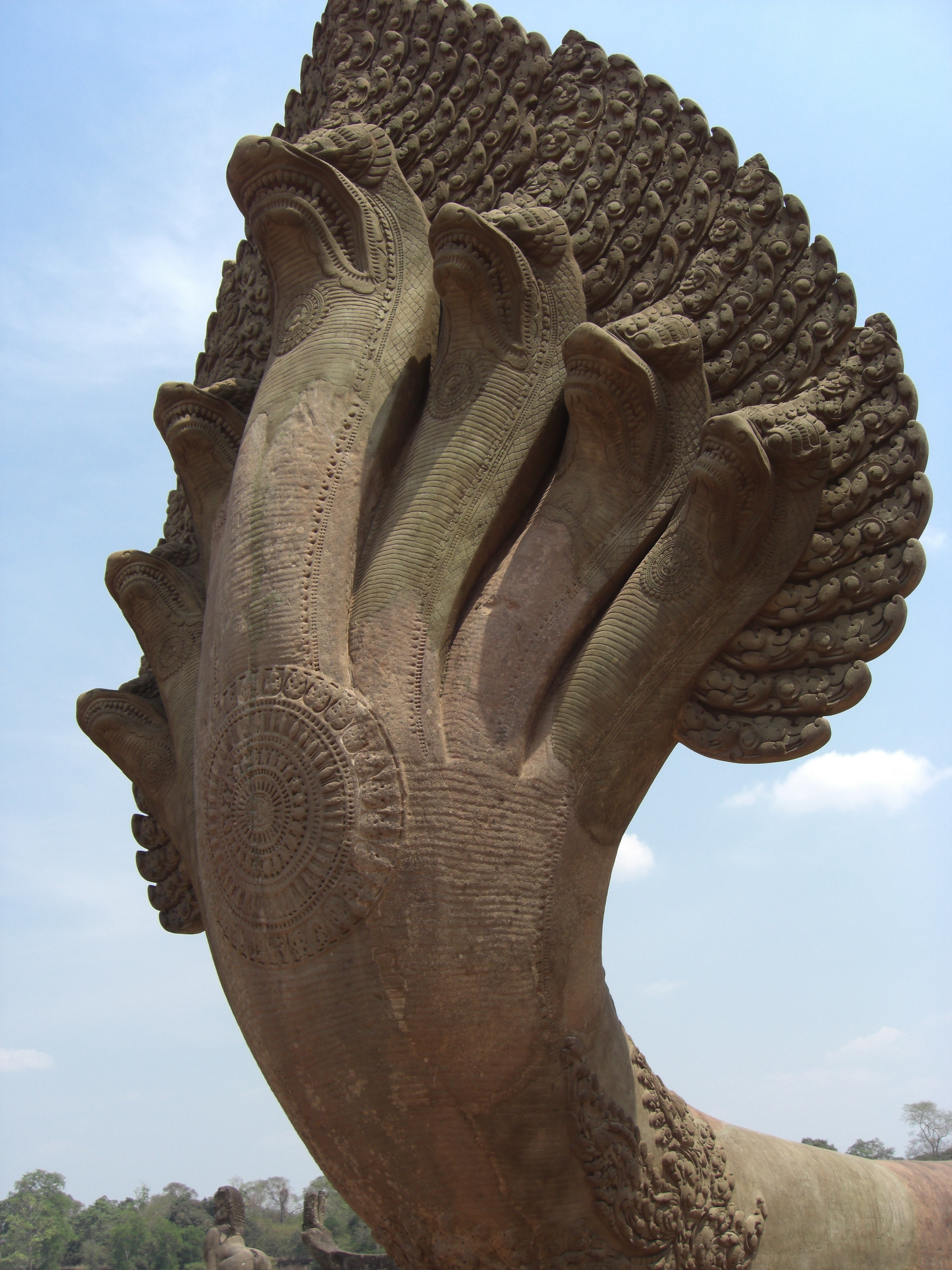 nnnnnn